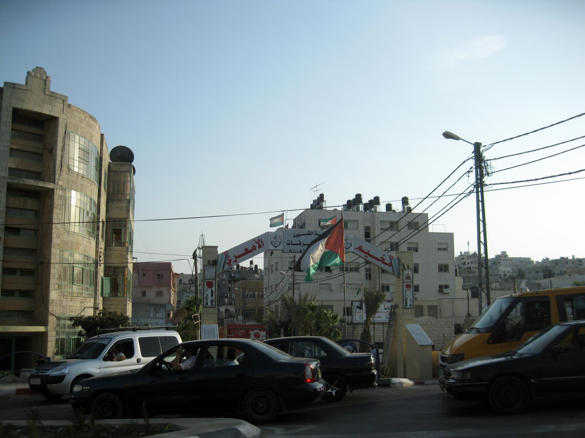 Ramala